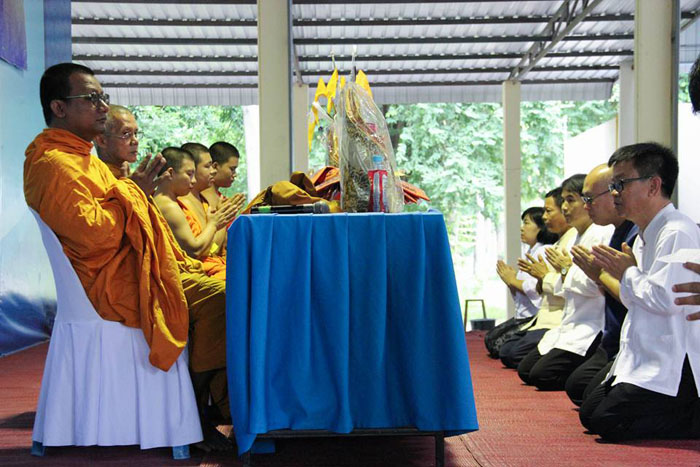 ถวายเทียน 60 ส.ว.